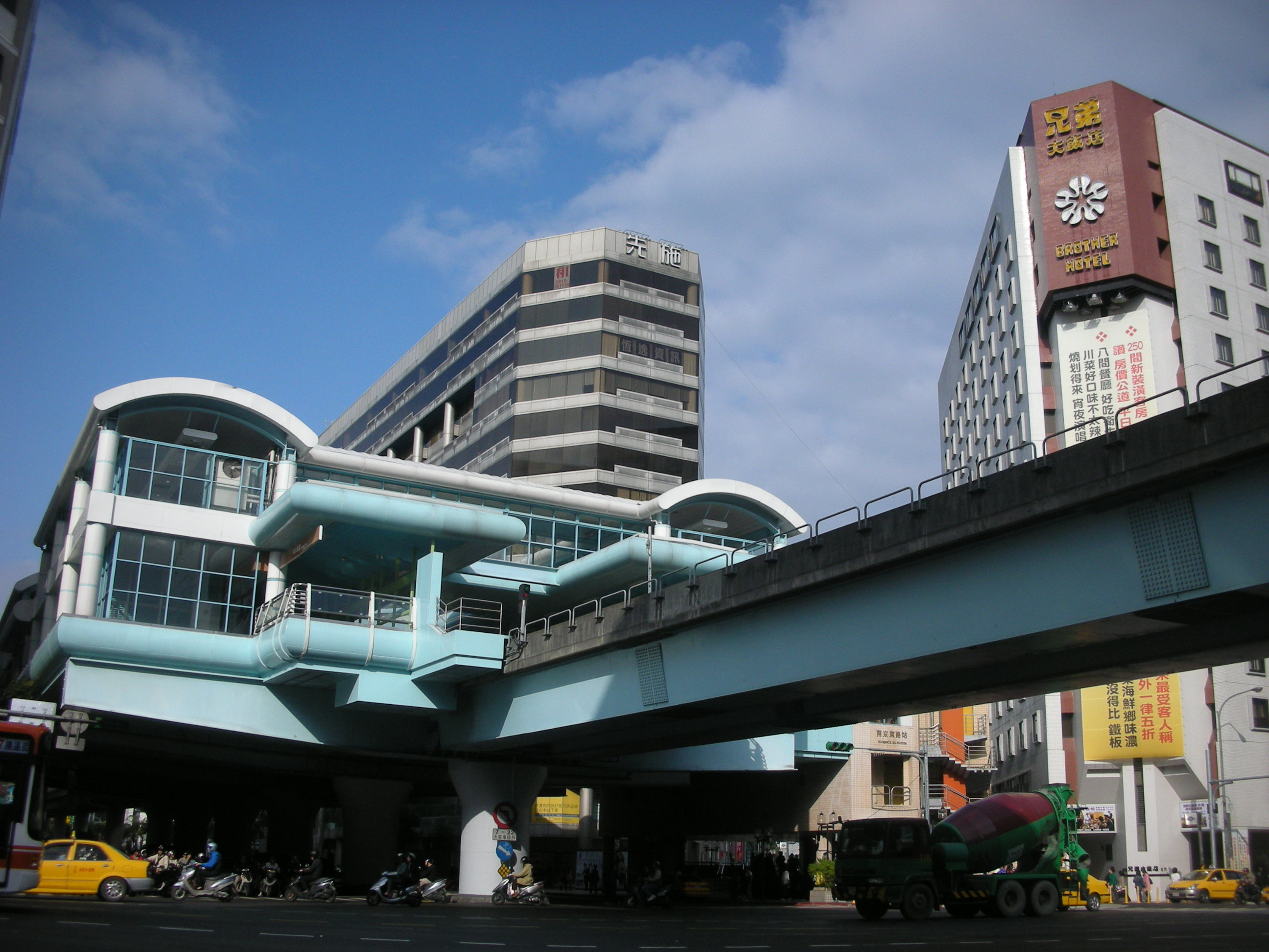 臺北捷運南京東路站、先施百貨臺北店與兄弟大飯店。